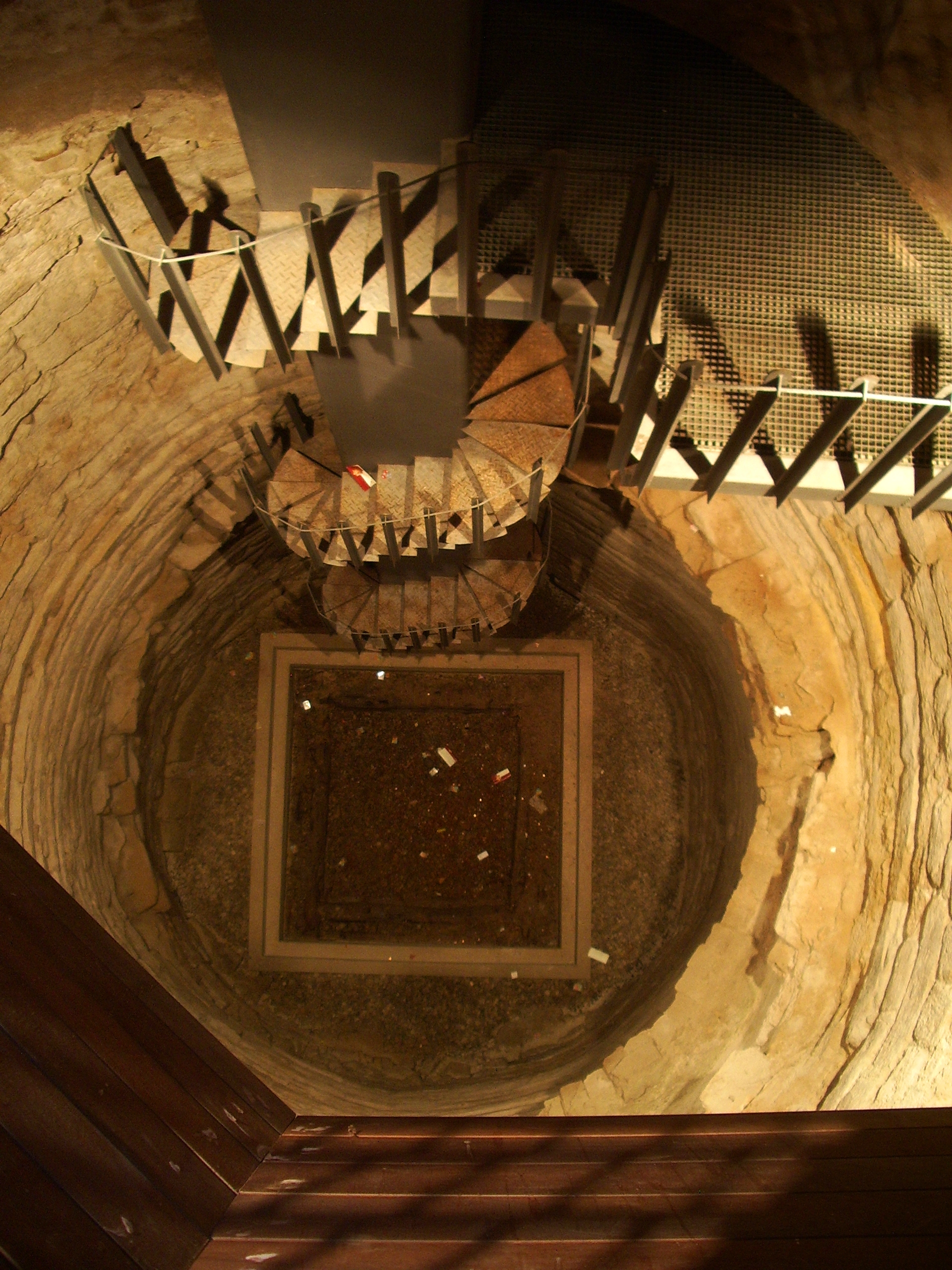 pozo de la torre del trovador de la aljaferia